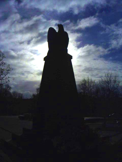 Pomnik Bohaterów Miasta w Międzyrzecu Podlaskim (orzeł)